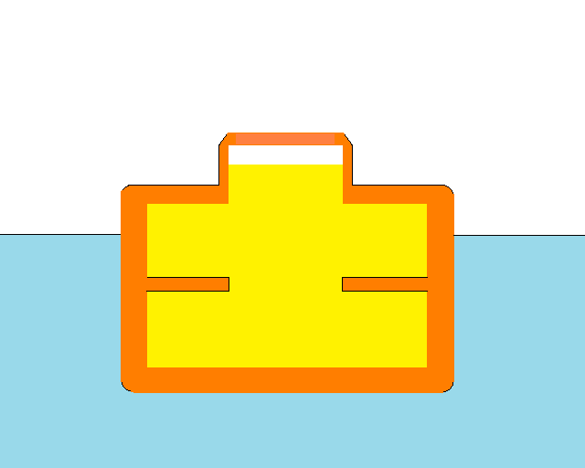 Laderaumschema eines Trunkdeckers